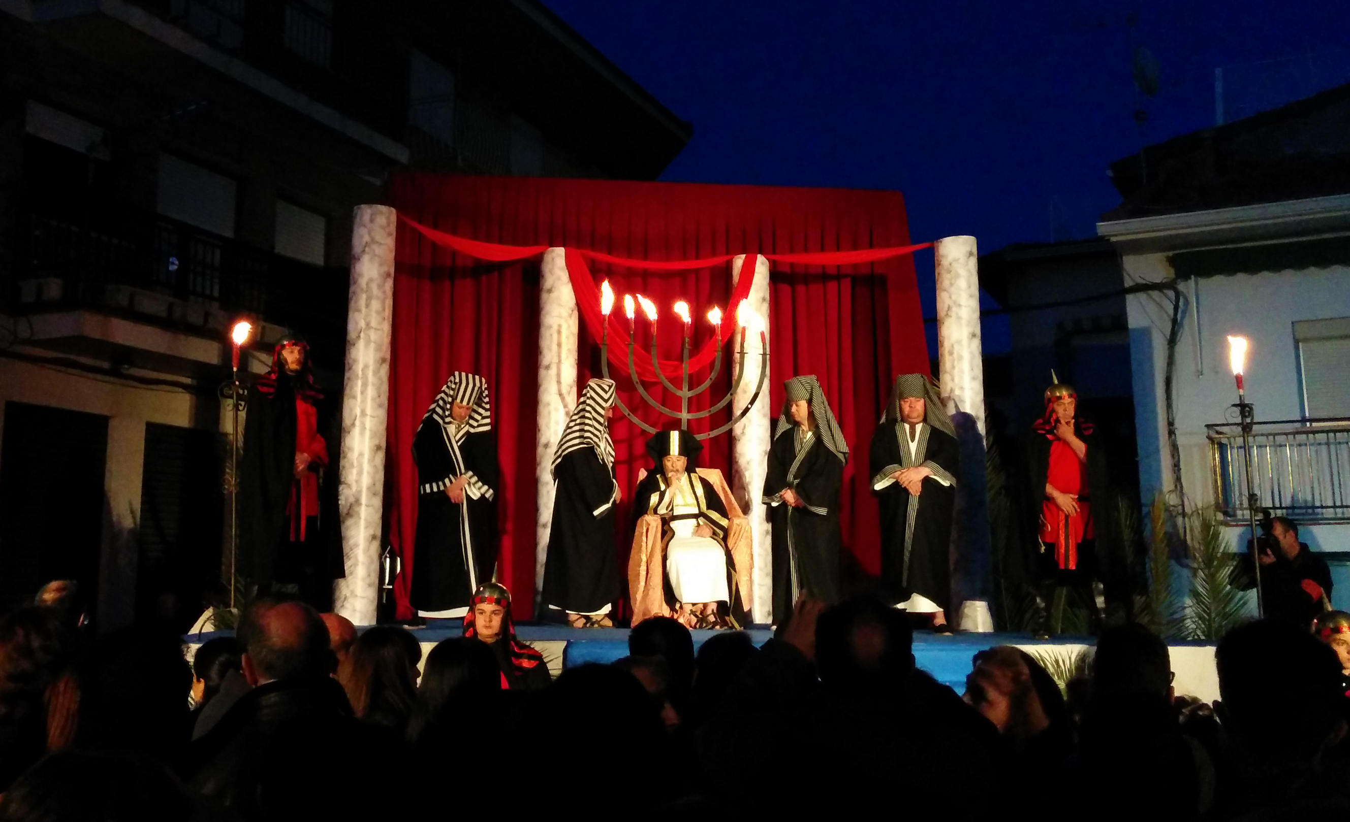 Pasión Viviente de Morata de Tajuña en 2016. This is a photography of a Folklore festival in Spain (Wikidata id Q23453336).